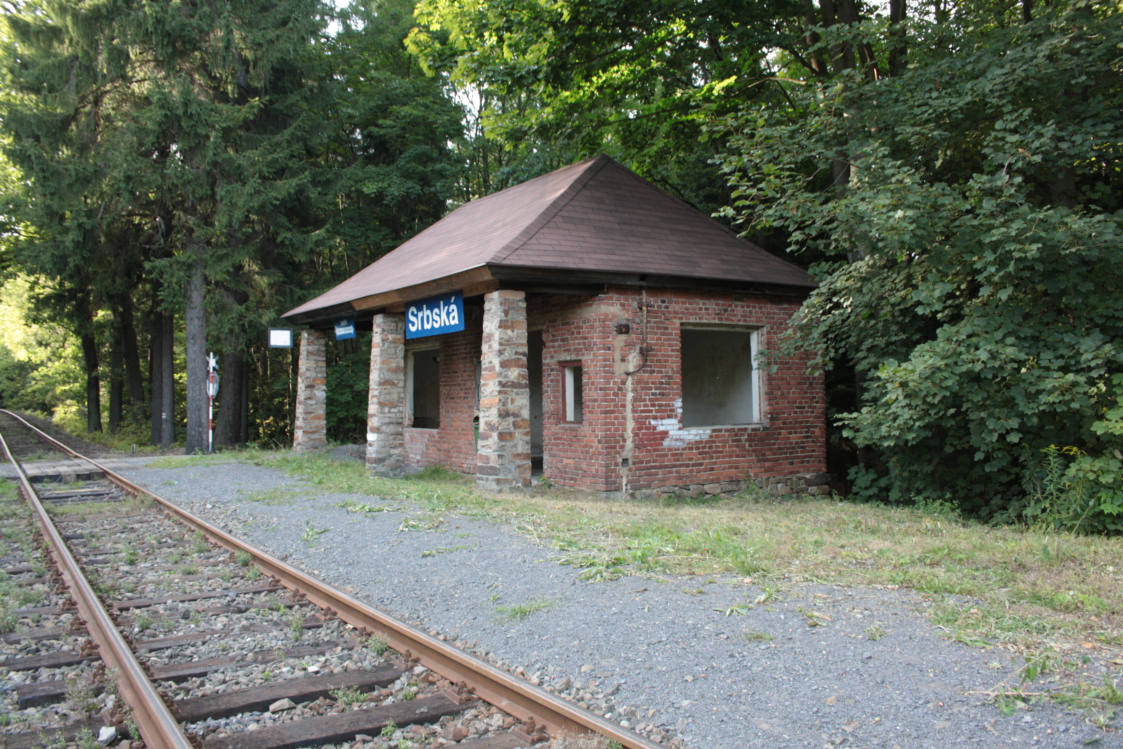 This photograph was taken with a DSLR from WMCZ's Camera grant. Pohled od jihovýchodu na čekárnu v železniční zastávce Srbská.